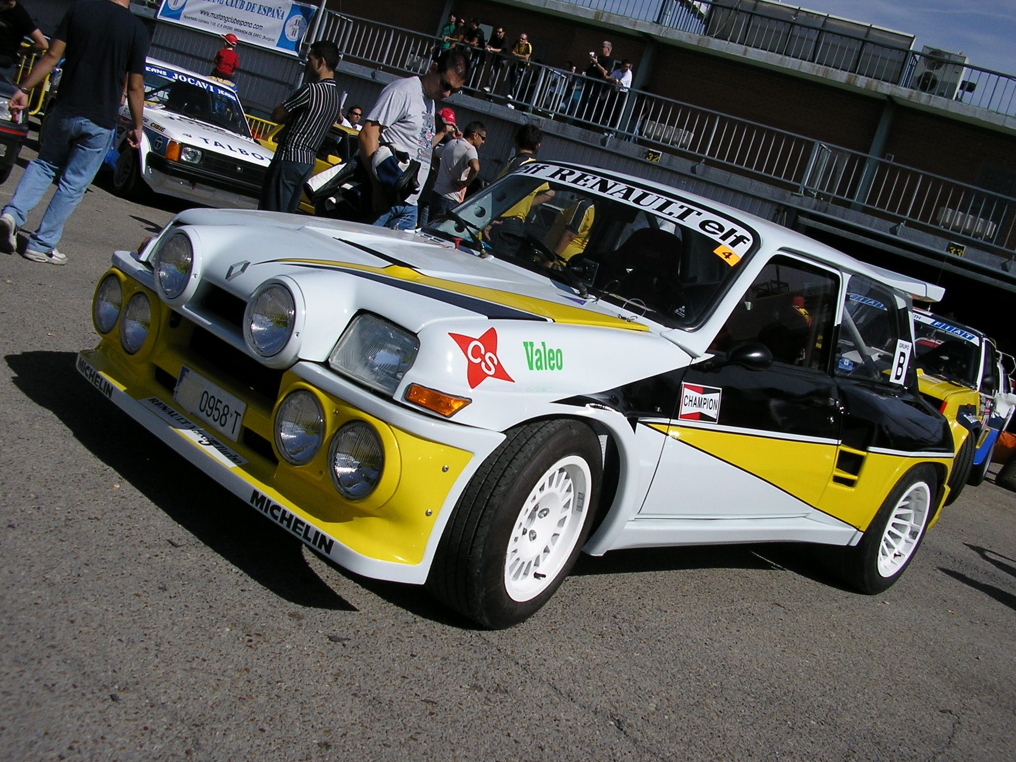 Renault 5 Maxiturbo shown in Circuito del Jarama (Madrid). Jornada de puertas abiertas 2006.